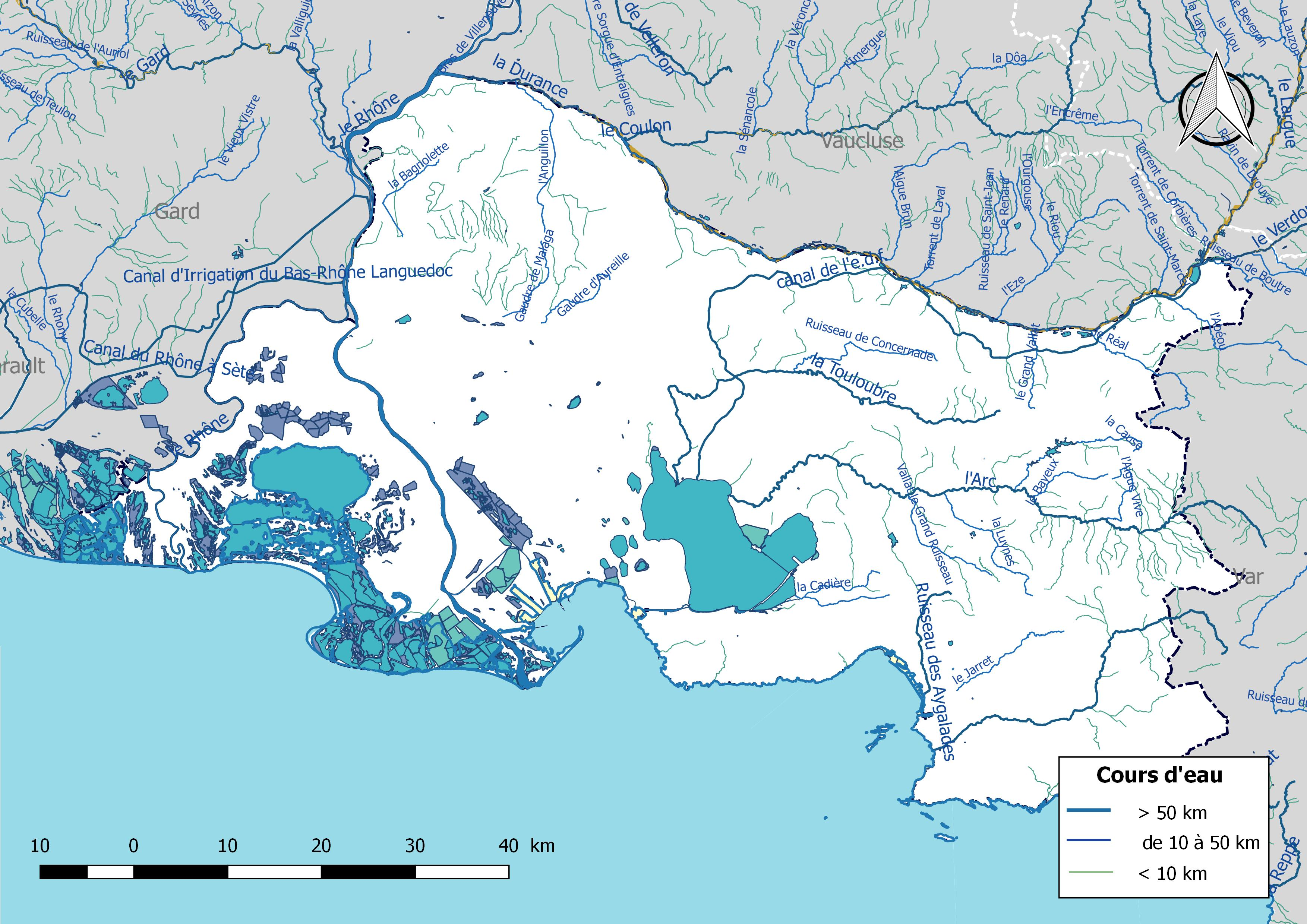 Réseau hydrographique du département des Bouches-du-Rhône (France).